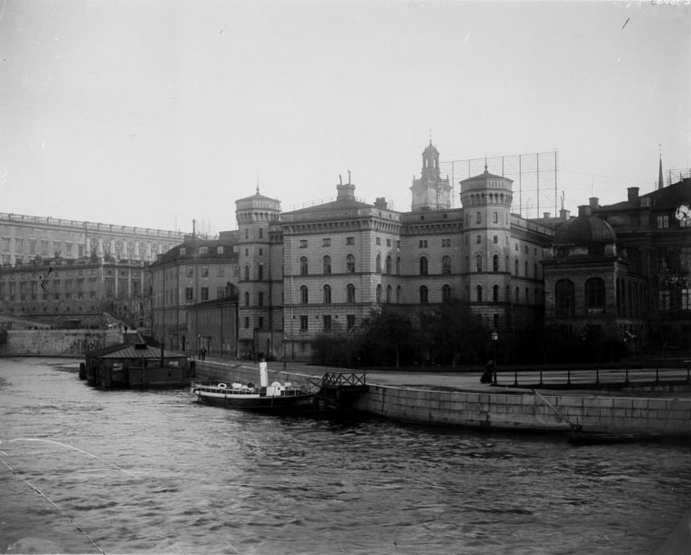 Rannsakningsfängelset, Cellfängelset på Myntgatan 6, från norr Upphov: Okänd. Tid: 1896 Beteckning: Fotonummer Fa 29150 ; Fotonummer C 1593